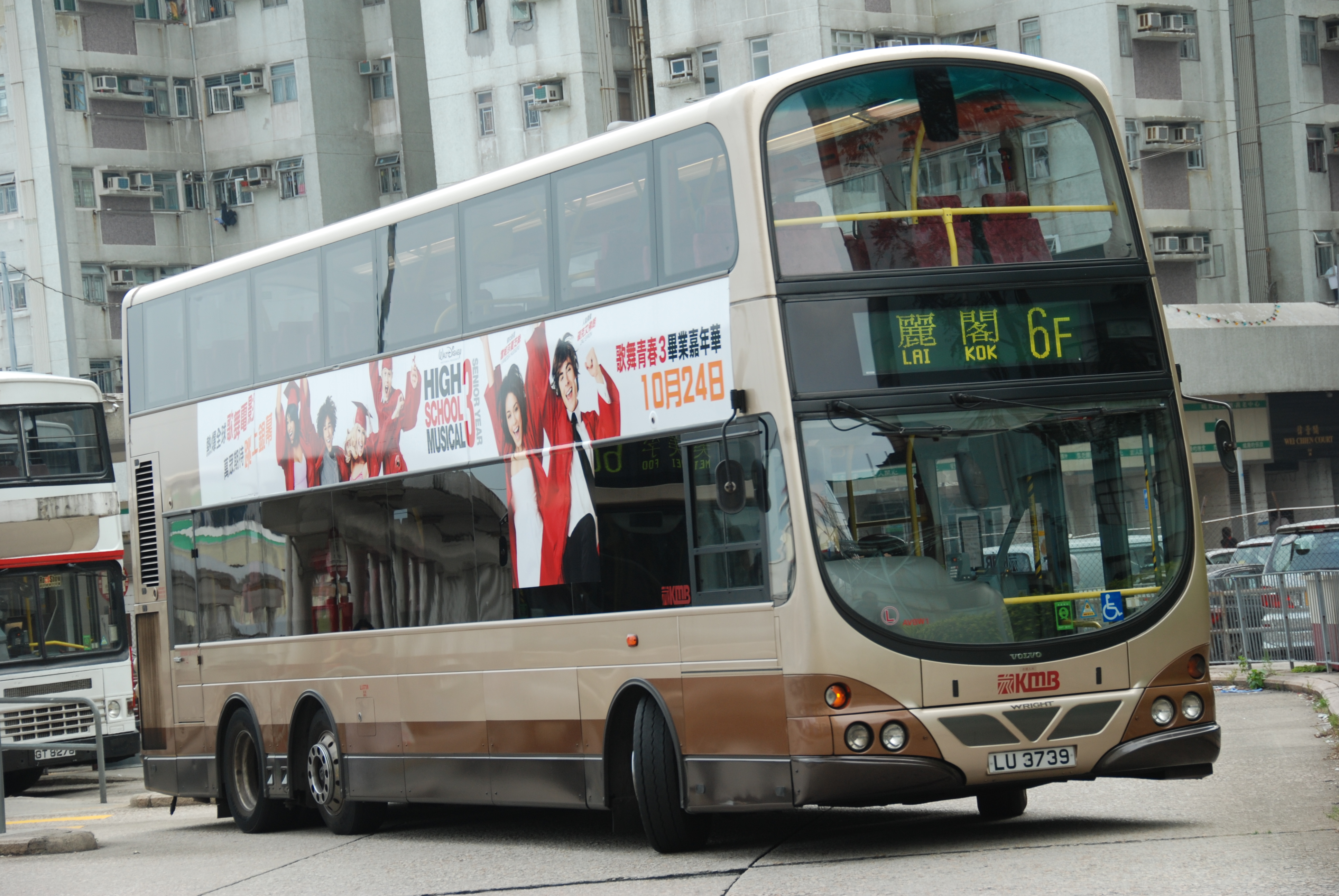 中文（香港）: 九巴AVBW01